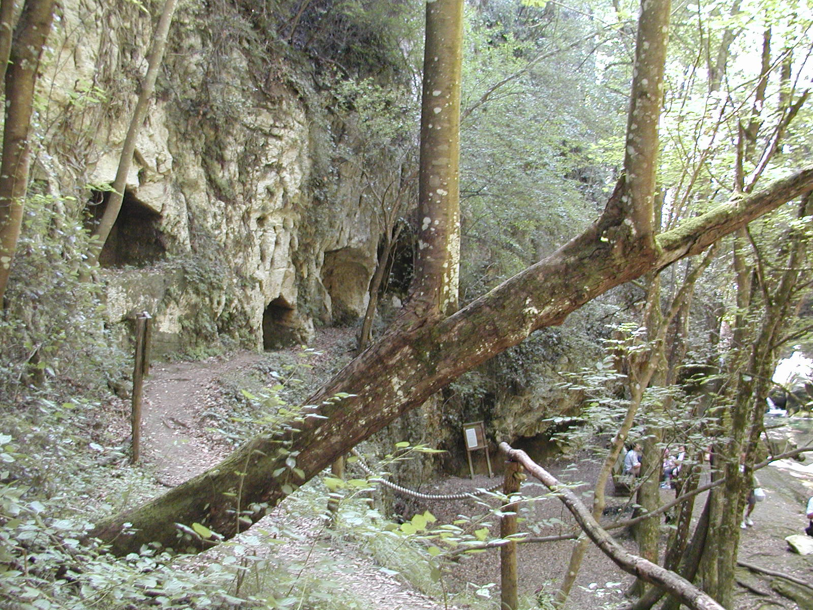 Serramonacesca Natur pur